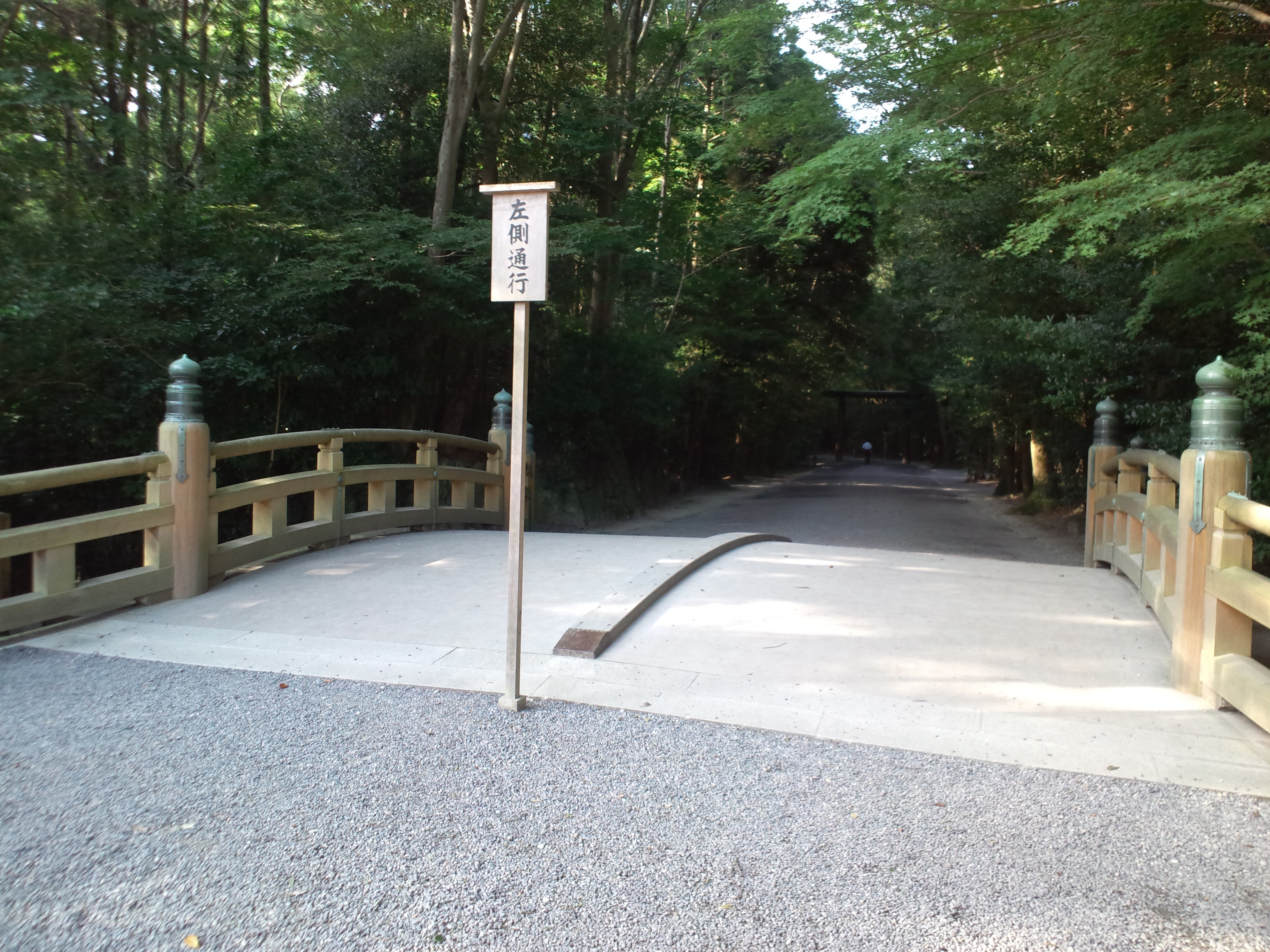 伊勢神宮 外宮 火除橋